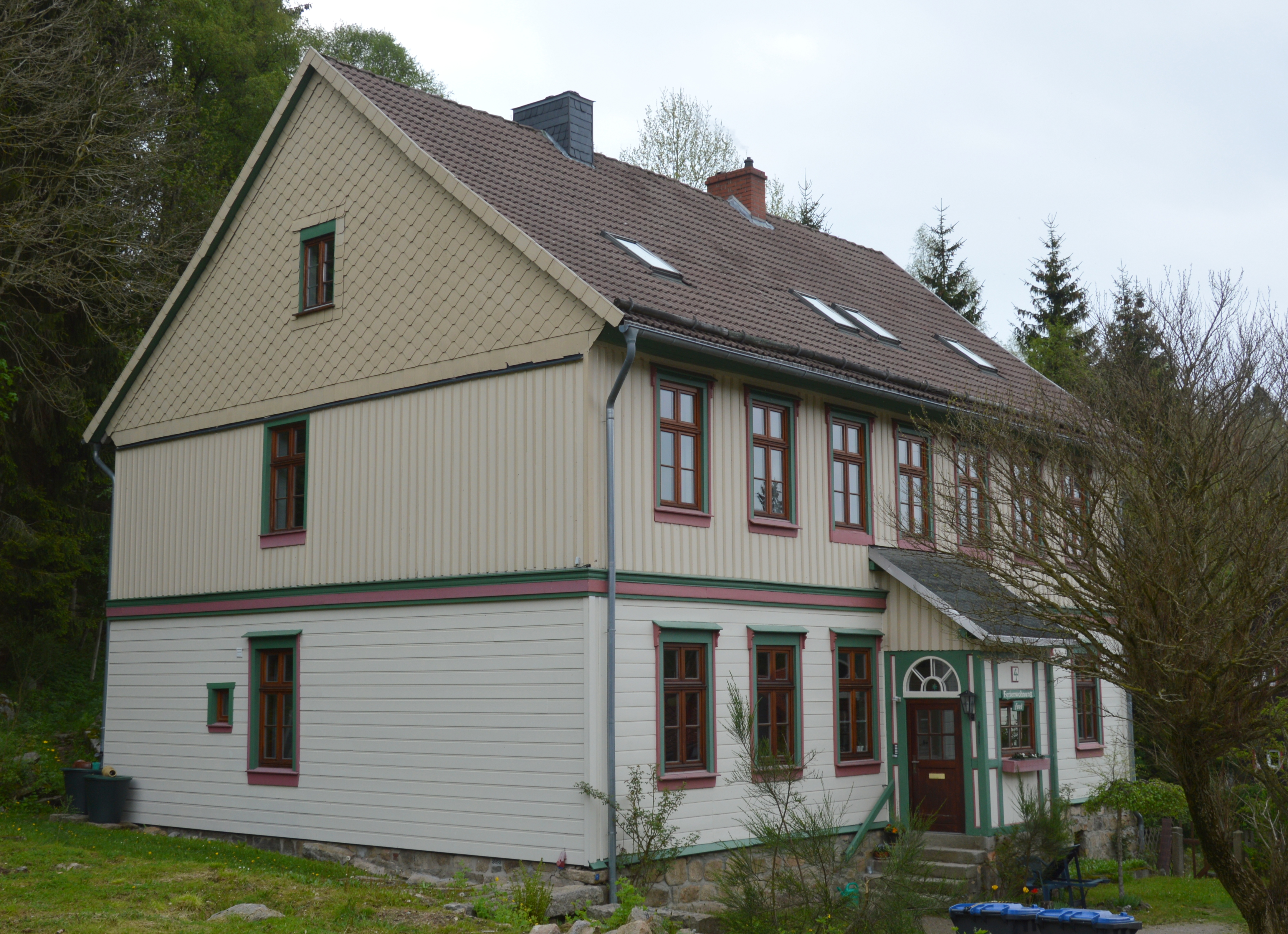 Kirchberg 4 in Schierke